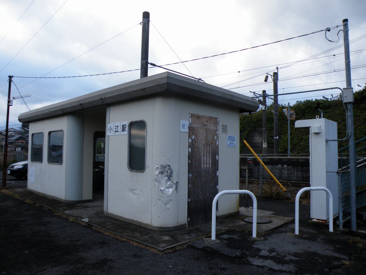 JR九州長崎本線小江駅待合室